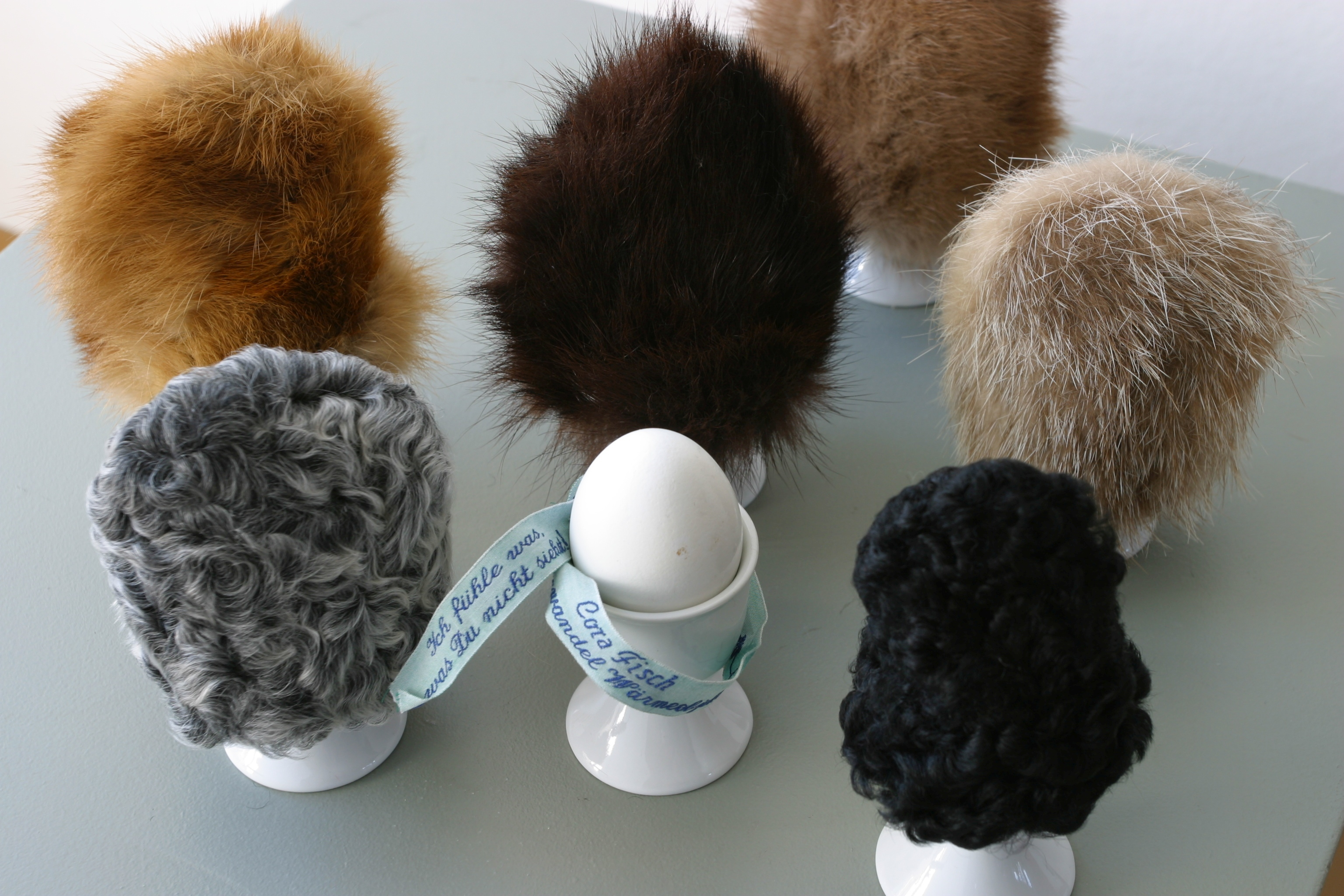 Eierwärmer aus Pelz. Kunstprojekt der Cora Fisch, Berlin. Materialien: Rotfuchsfell, Persianerfell, Nerzfell, Mutationsnutriafell.